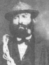 Le guide Jean-Baptiste Croz (1828-1905)